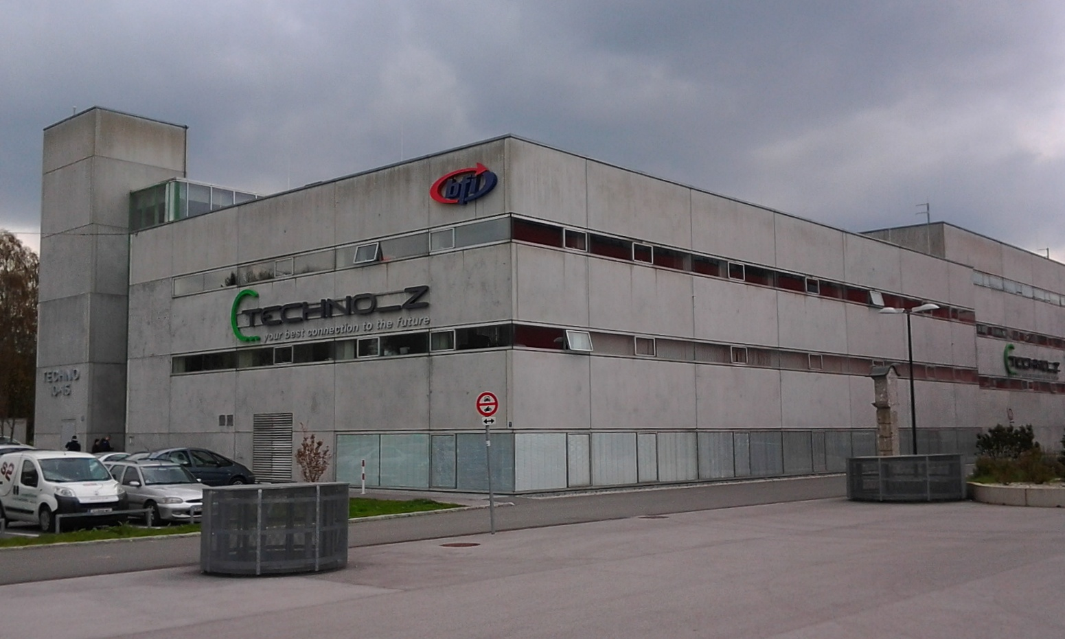 Ein Gebäude des Techno-Z in Salzburg Itzling, eines Zentrums für Unternehmen im High-Tech-Bereich sowie Lehr- und Forschungseinrichtungen.